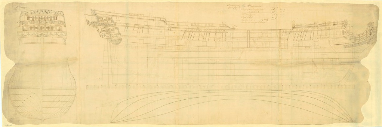 Profil du vaisseau français le Magnanime de 74 canons capturé en 1748 au large de la Bretagne. Guerre de Succession d'Autriche.